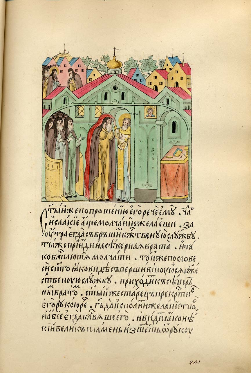 Сергий Радонежский благословляет Исаакия на подвиг молчания. Житие Преподобнаго и Богоноснаго Отца Нашего Сергия Радонежскаго. Рукопись конца 16 века, изданная в литографии в 1853 году.